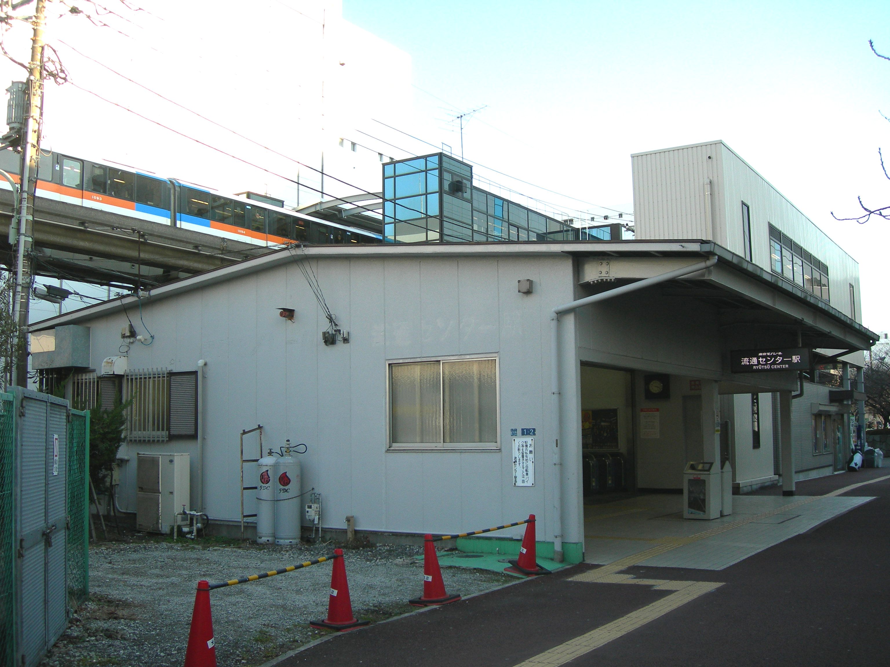 流通センター駅